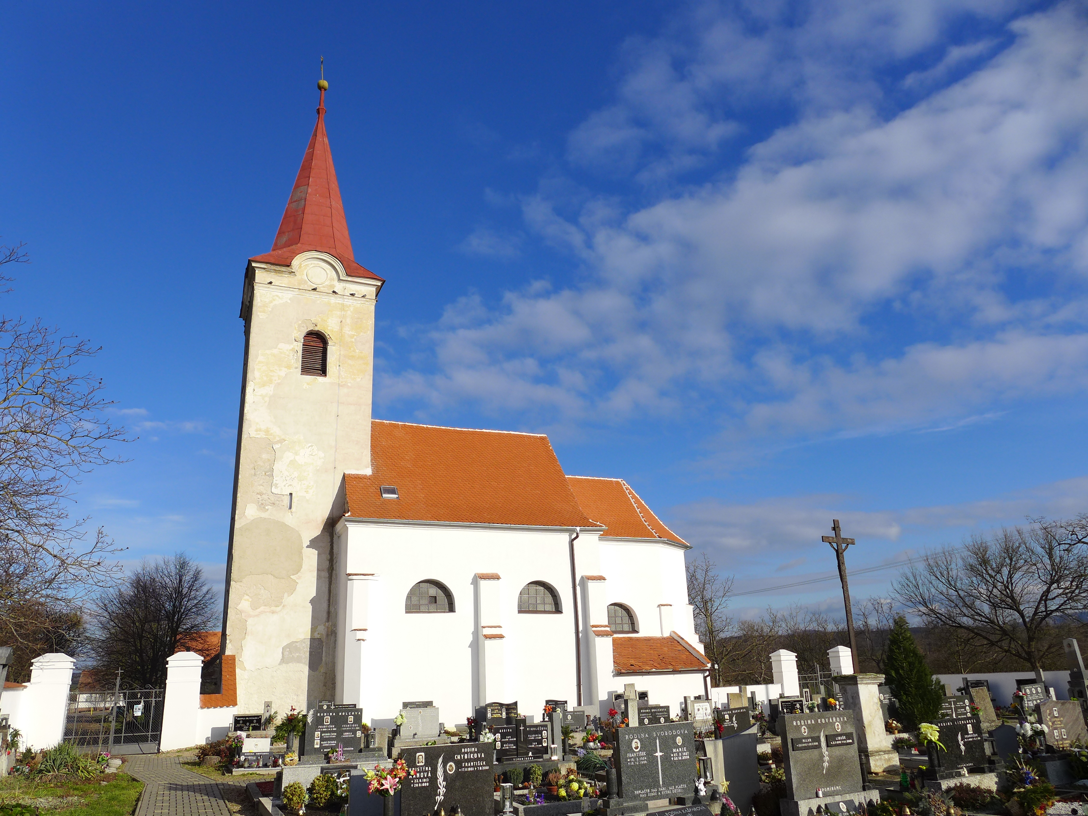 Kostel svaté Cecilie, Dobré Pole.